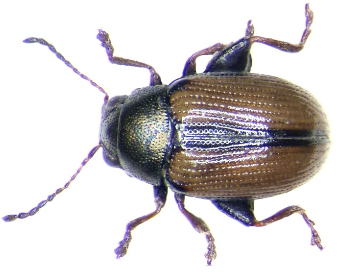 Chaetocnema conducta (Motschulsky, 1838) Familie: Chrysomelidae Grösse: 21,6-2 mm Verbreitung: Südeuropa Ökologie: an Juncus sp. und Eleocharis palustris Fundort: Jugoslavia, Montenegro, Sutomore leg. U.Schmidt, 1982; det. Fritzlar Foto: U.Schmidt, 2006